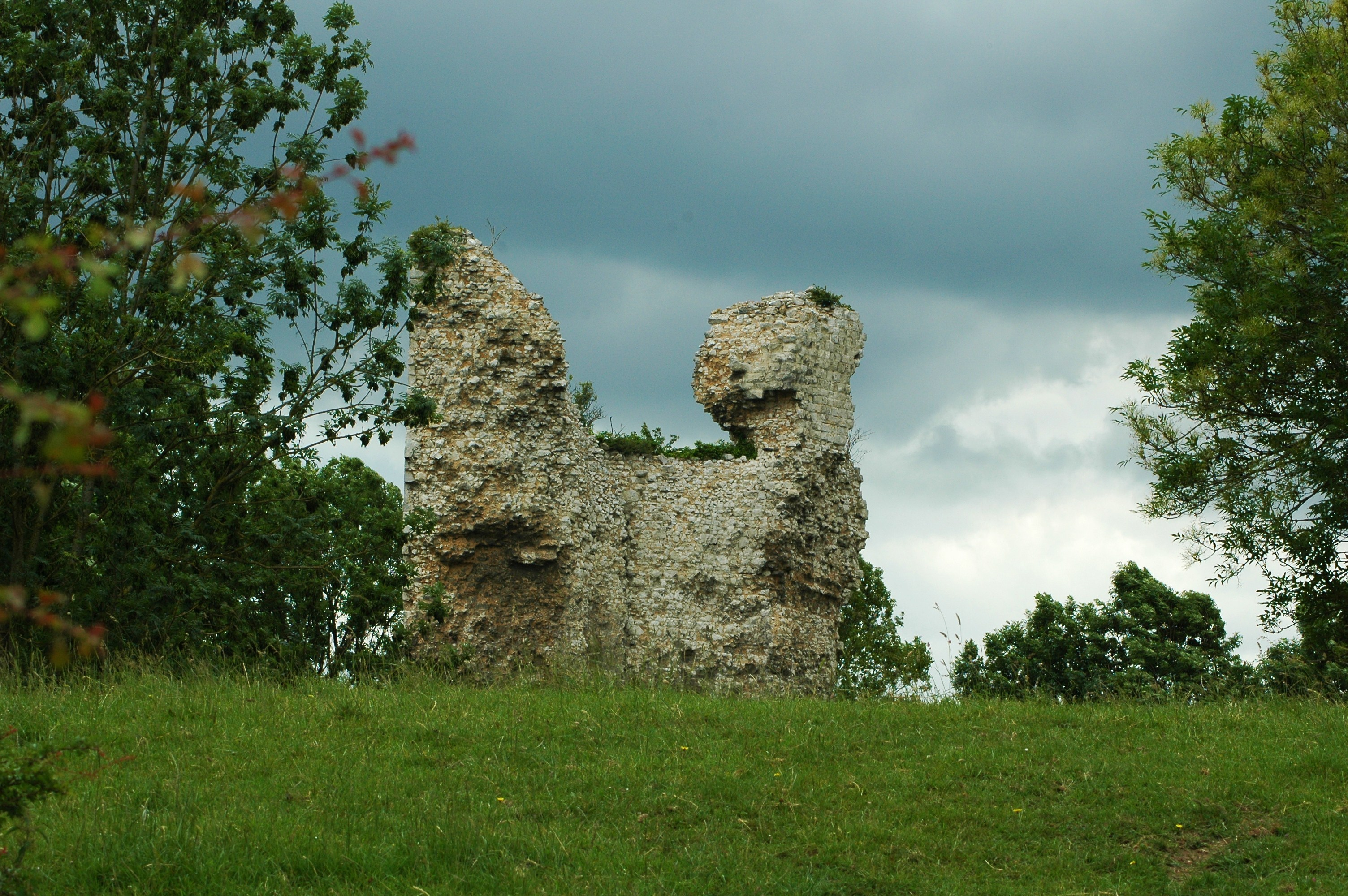 Bailleulmont (Pas-de-Calais, France). Ruines du château médiéval.